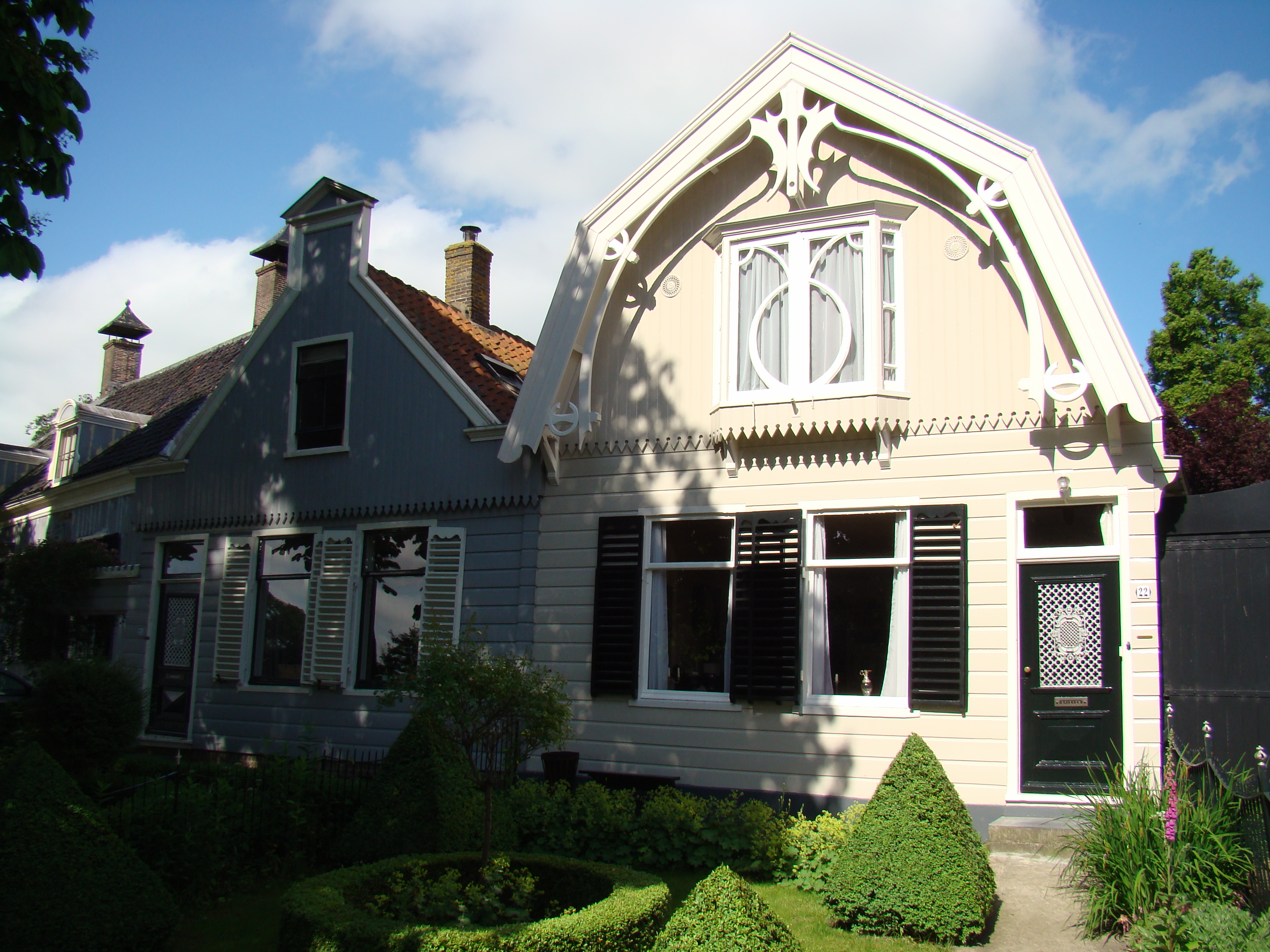 Rijksmonumenten in Broek in Waterland, Netherlands De Erven 22